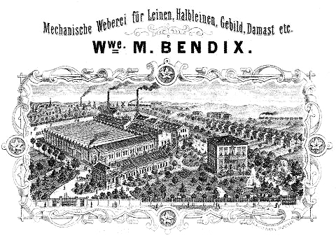 Karte der Wwe. M. Bendix Mechanische Weberei für Leinen, Halbleinen, Gebild, Damast etc. Dülmen, um 1880